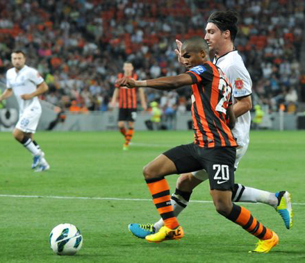 Сіто Рієра під час матчу з донецьким Шахтарем.